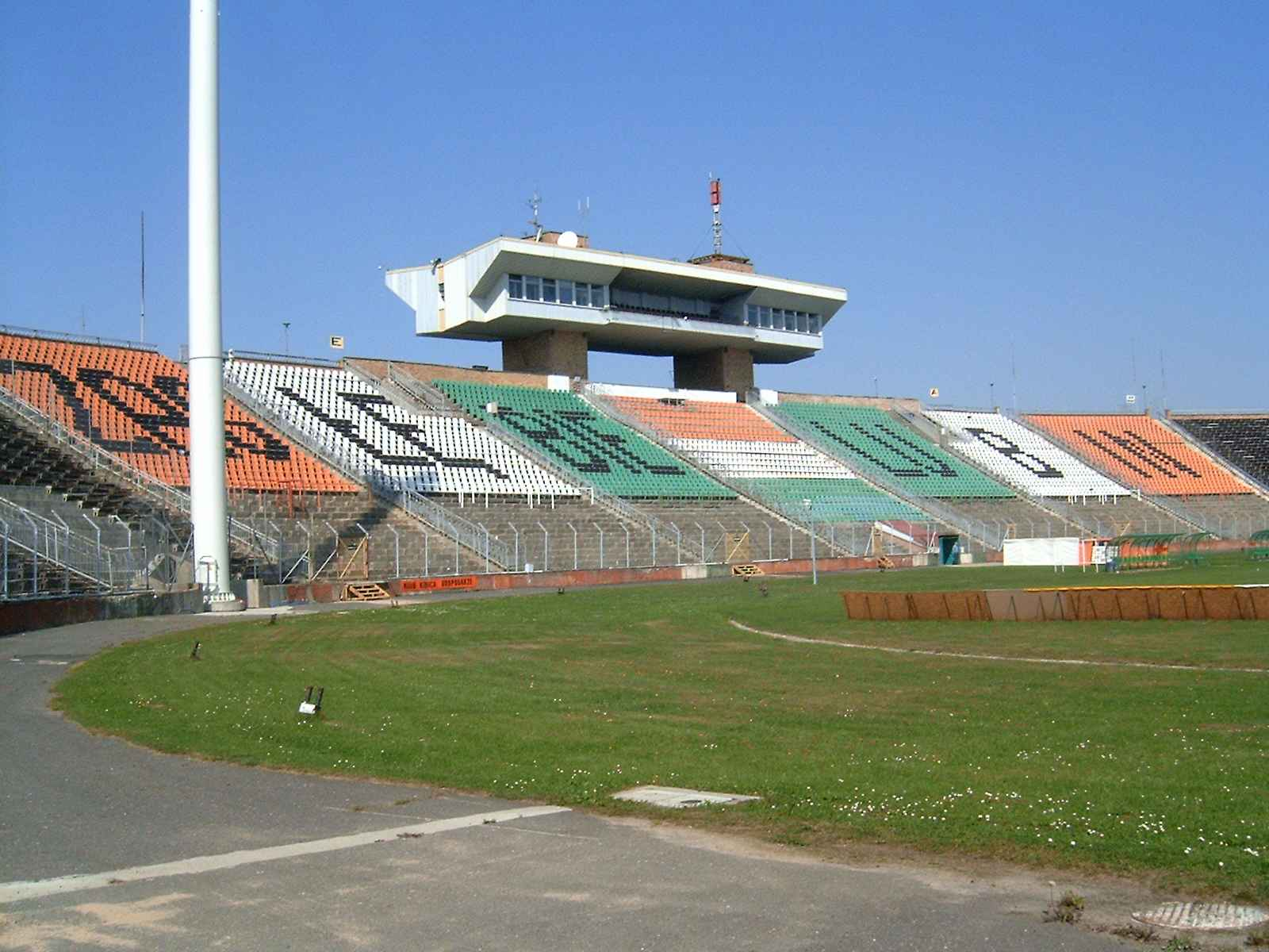 Lubin - stadion Zagłębia Lubin